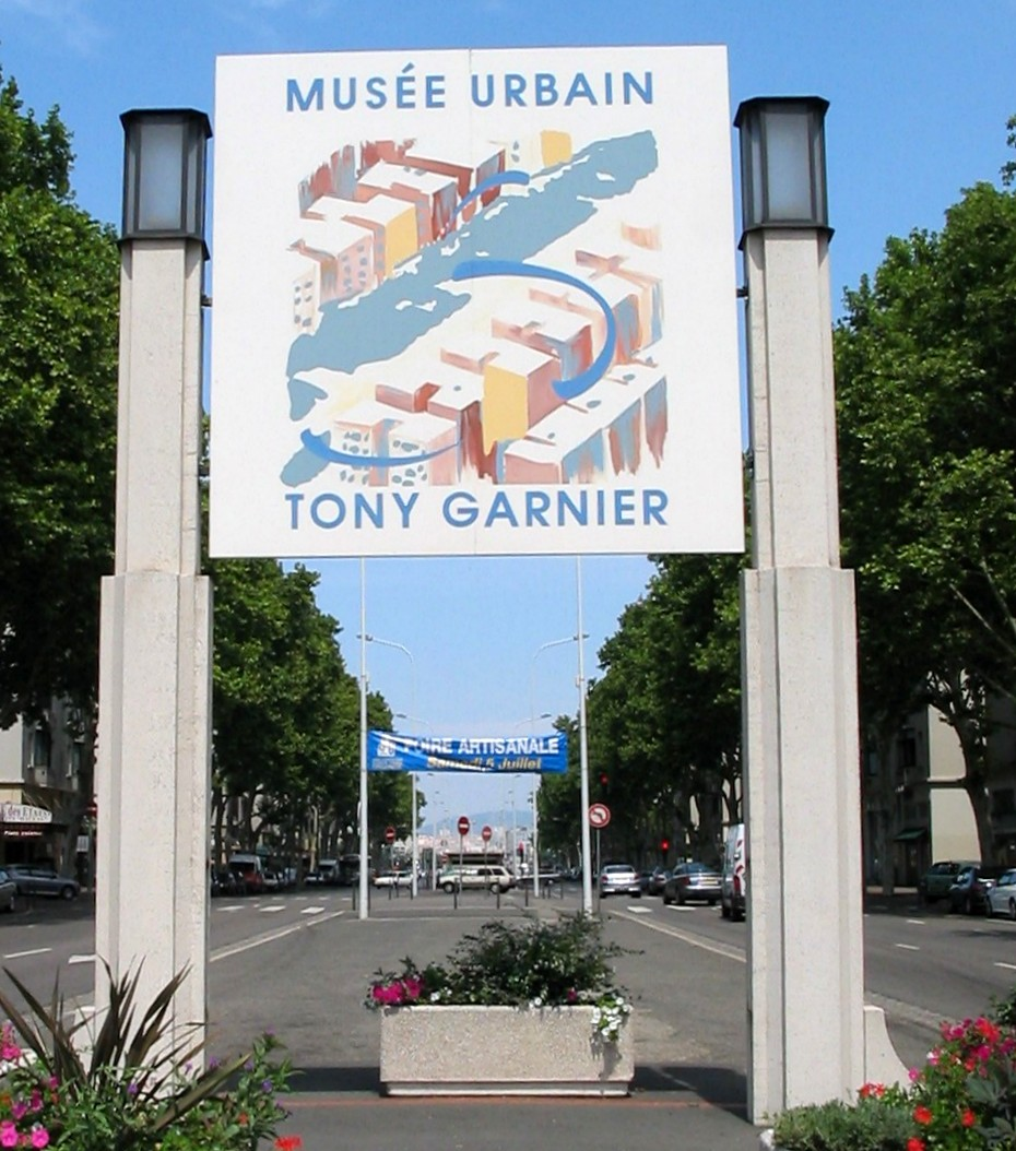 Musée Urbain Tony Garnier avant travaux tramway 2007-2008